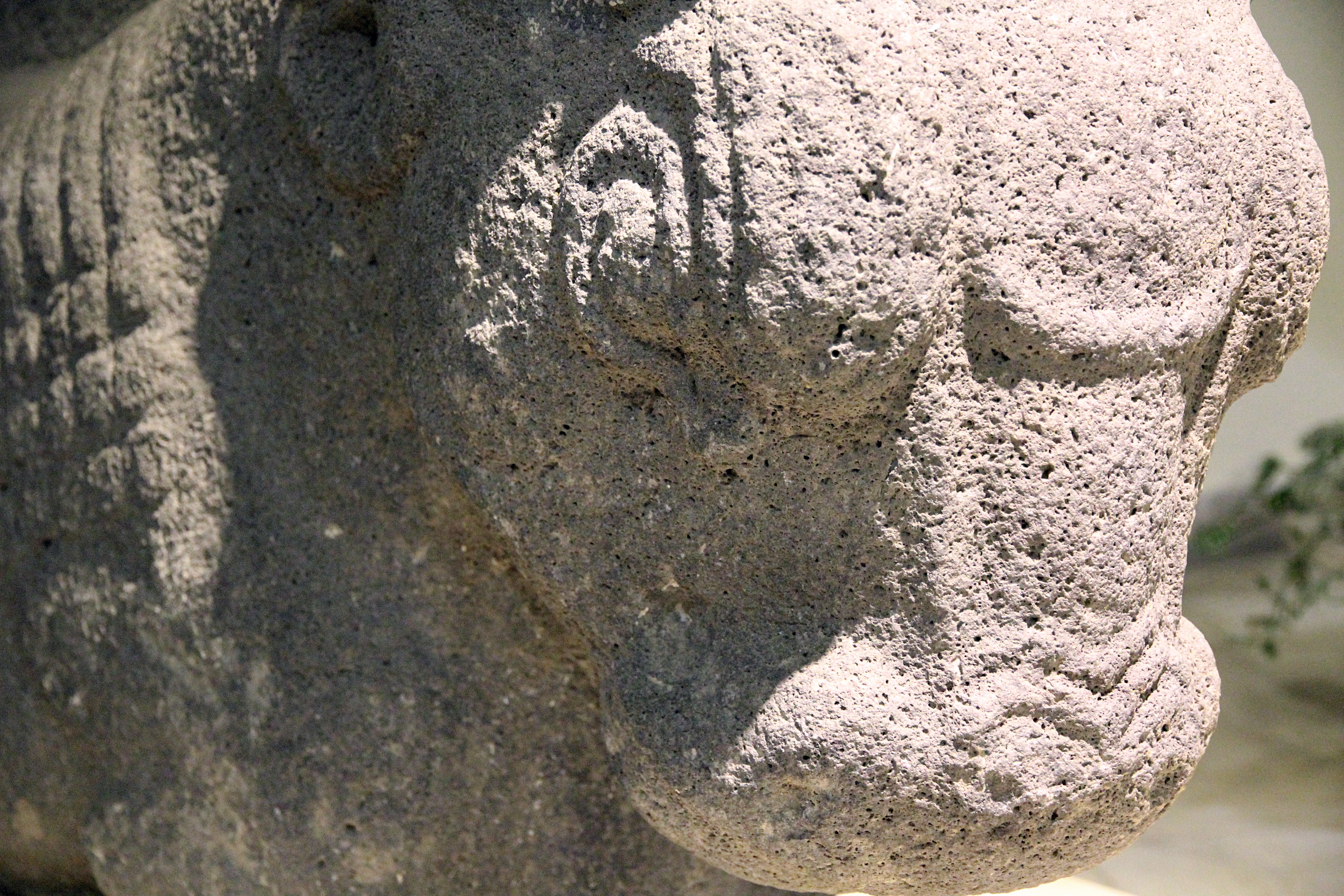 Archäologisches Museum Şanlıurfa, Südosttürkei, Stierskulptur aus Kabahaydar, Detail